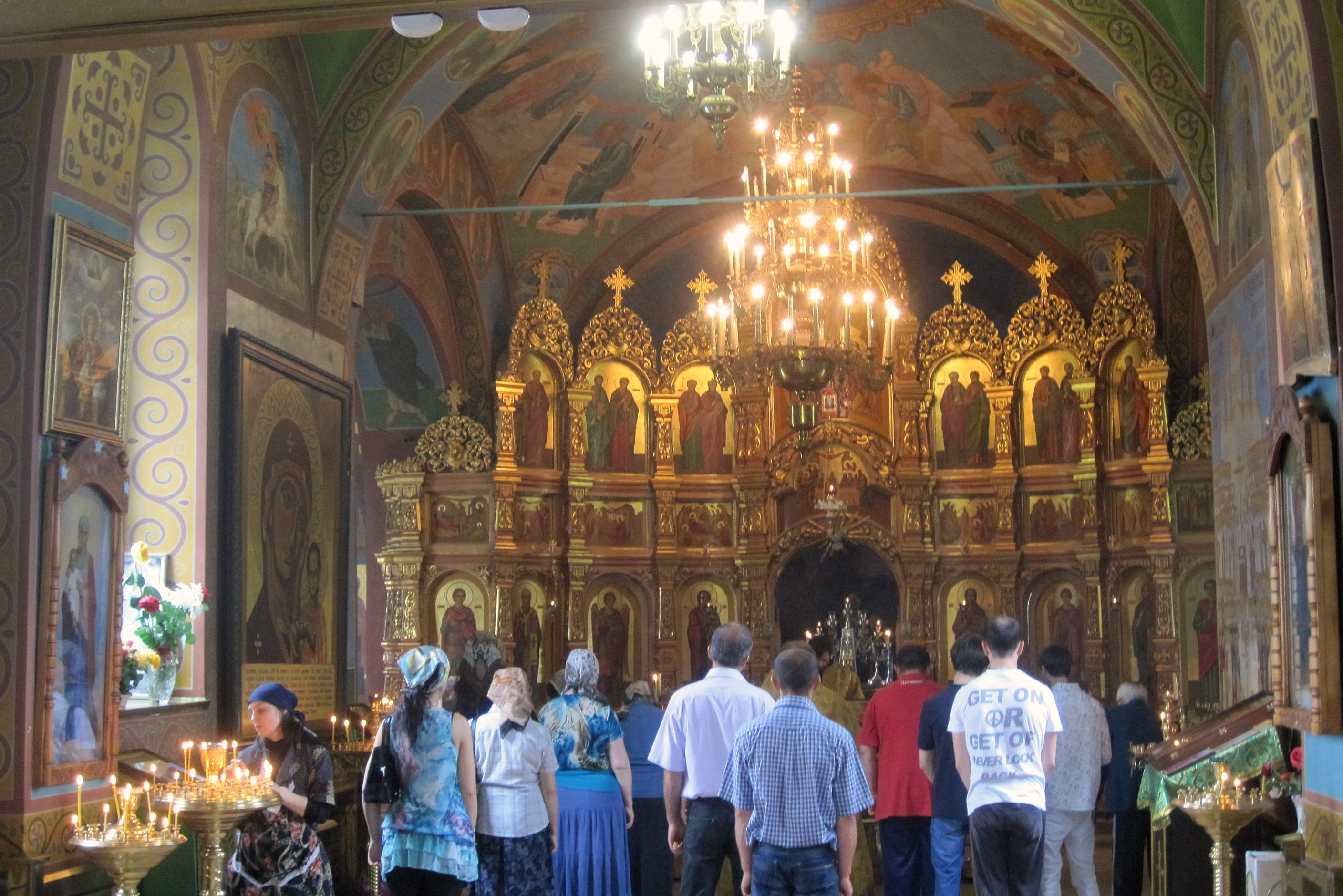 Осетинская церковь (Республика Северная Осетия-Алания, Владикавказ, хетагурова улица, 23)